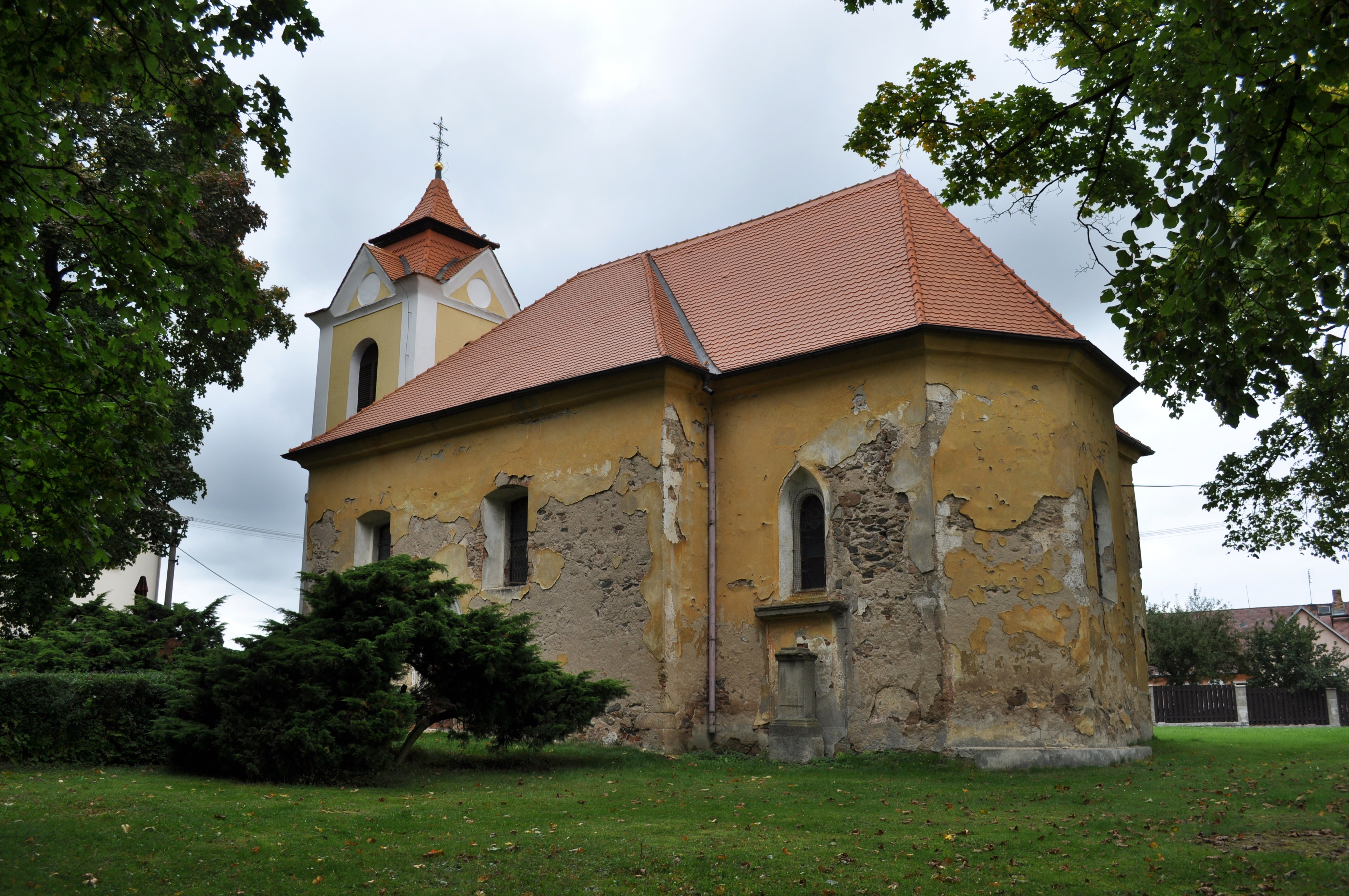 Kostel sv. Blažeje ,Vysoká Libyně